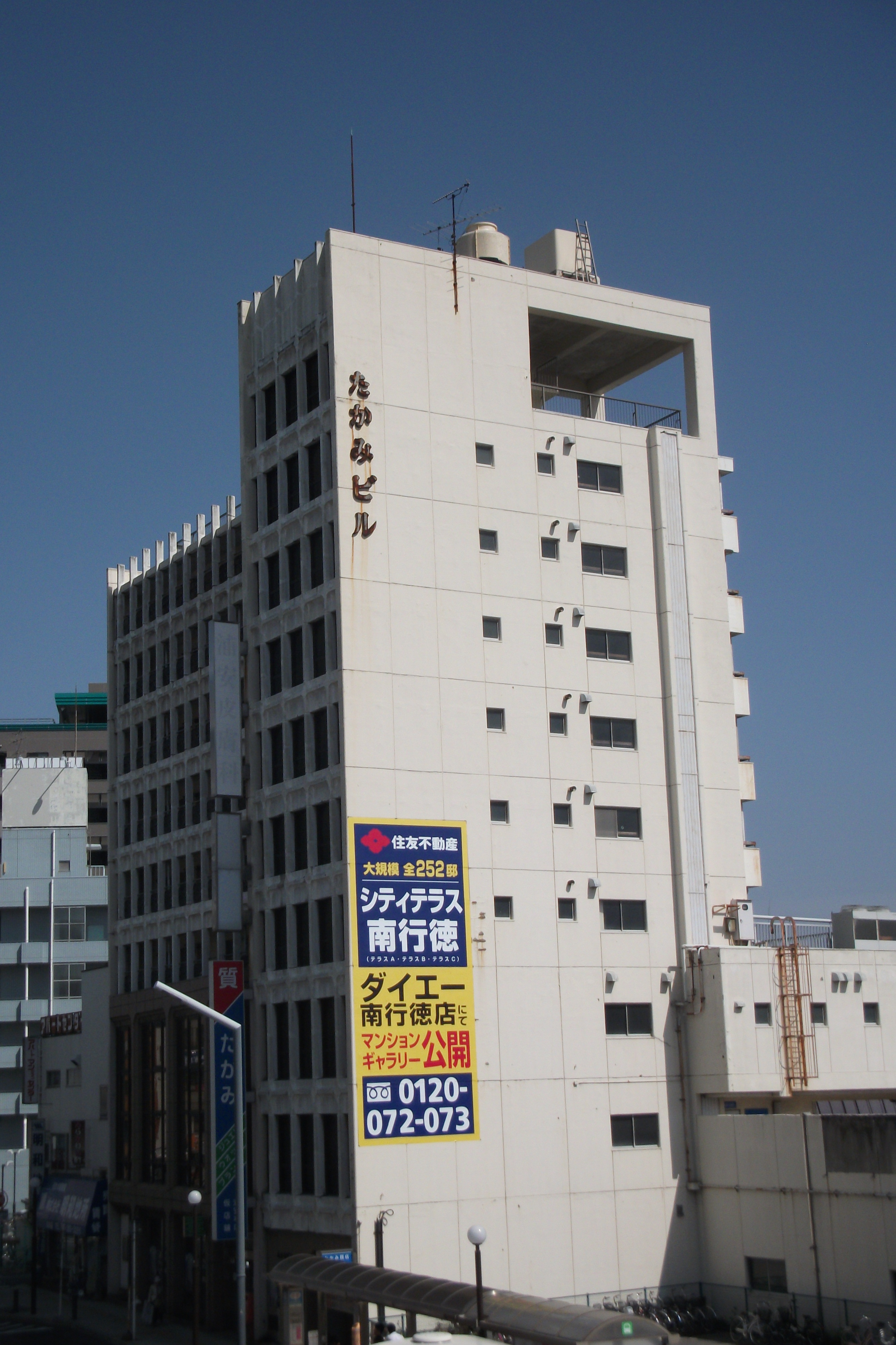 千葉県浦安市 エフエム浦安（FMうらら）本社･演奏所・送信所が入居するたかみビル